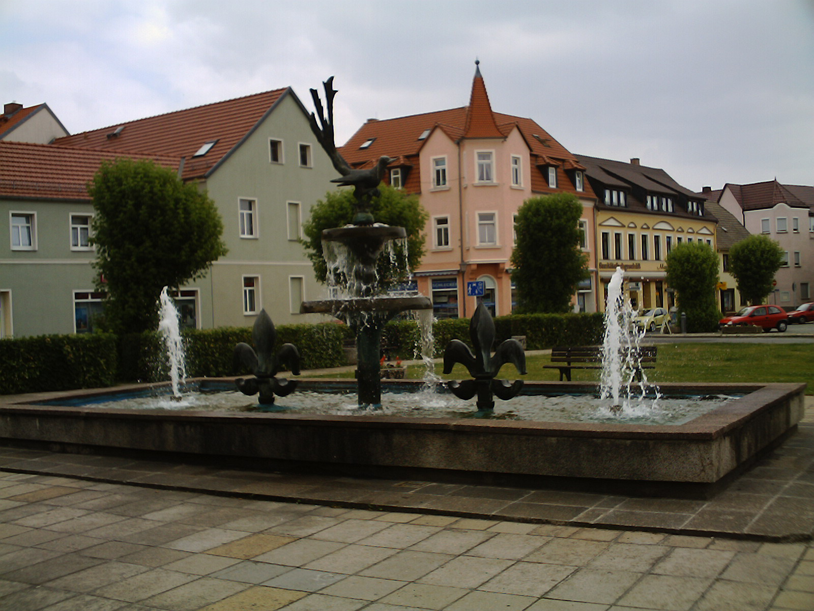 Der Elsterbrunnen